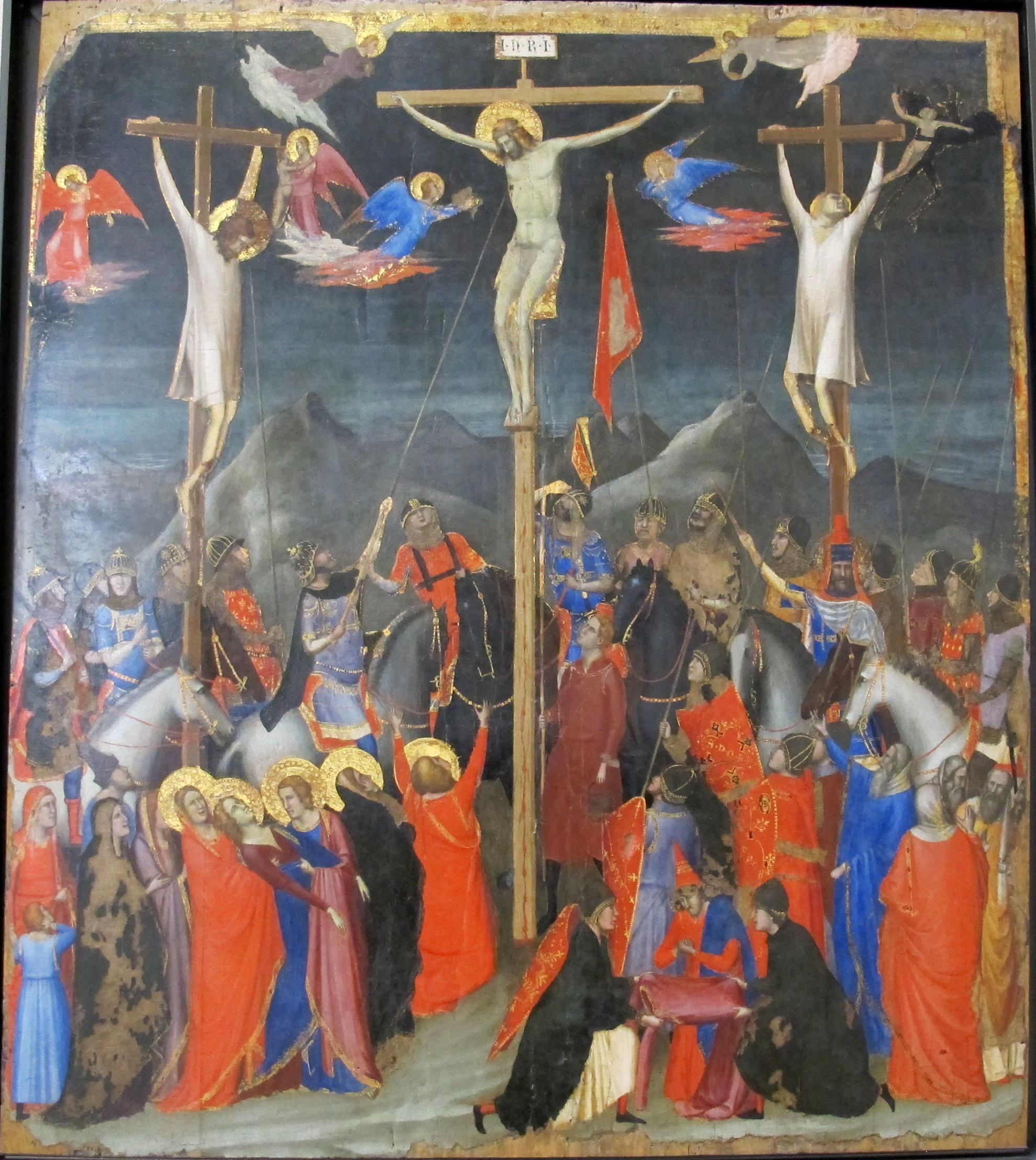 Pittura italiana del Trecento, Louvre